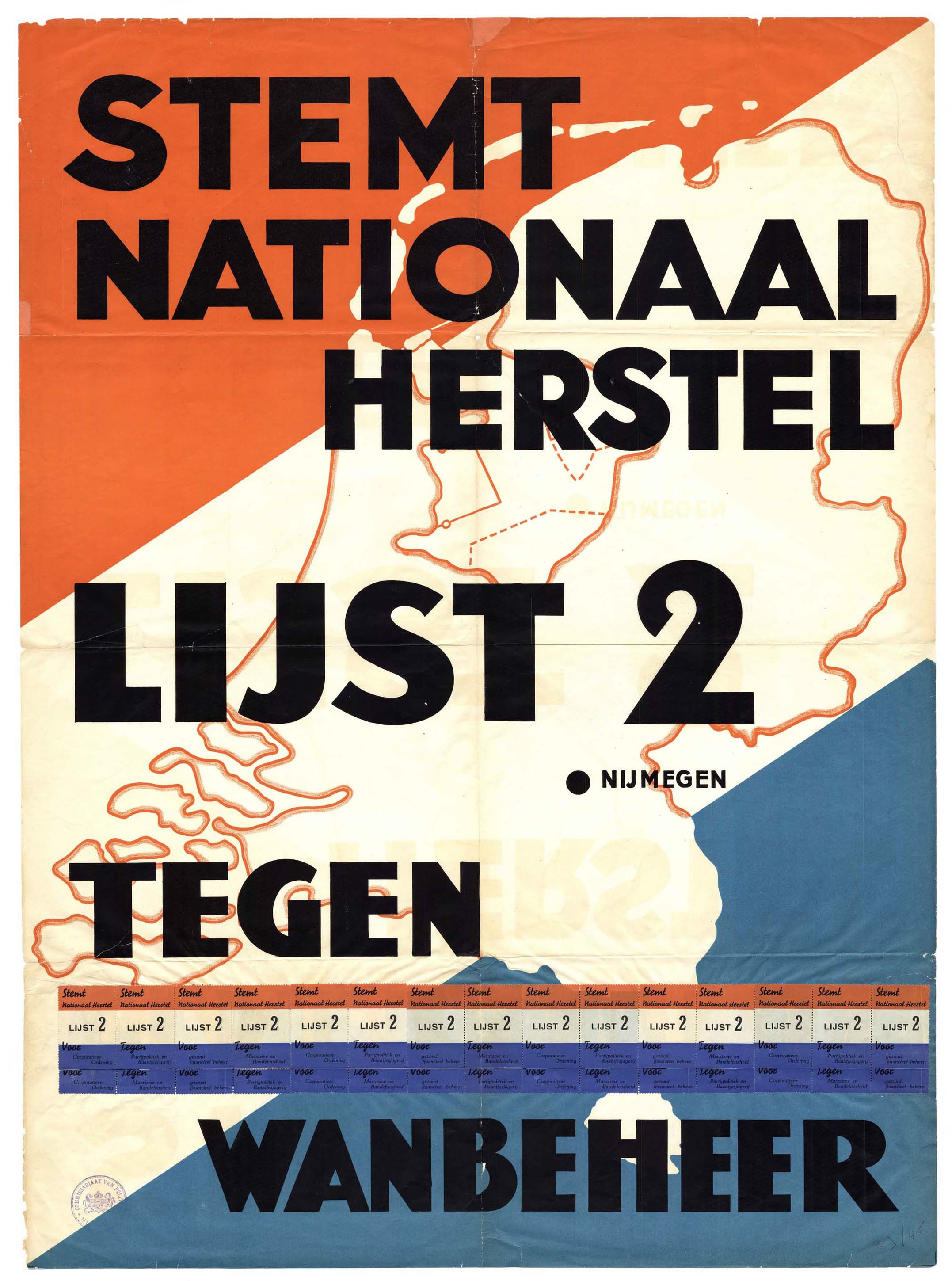 Stemt Nationaal Herstel Lijst 2. Tegen wanbeheer. Beschrijving Oproep voor de gemeenteraadsverkiezingen Nijmegen door de partij Nationaal Herstel .Op de voorzijde een stempel van het Commissariaat van Politie te Nijmegen op 17 juni 1935.